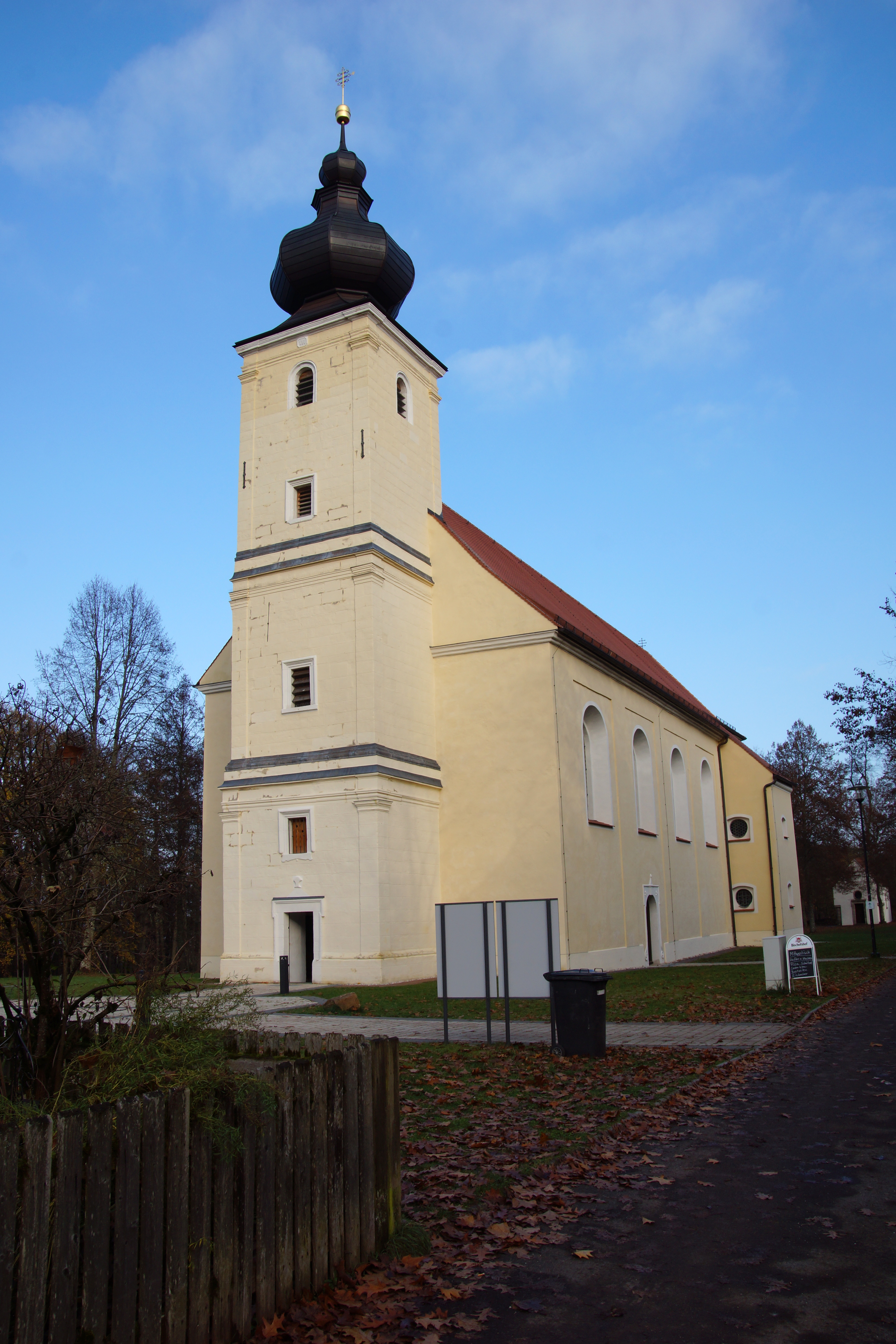 Die Wallfahrtskiche Mariä Himmelfahrt auf dem Frohnberg bei Hahnbach